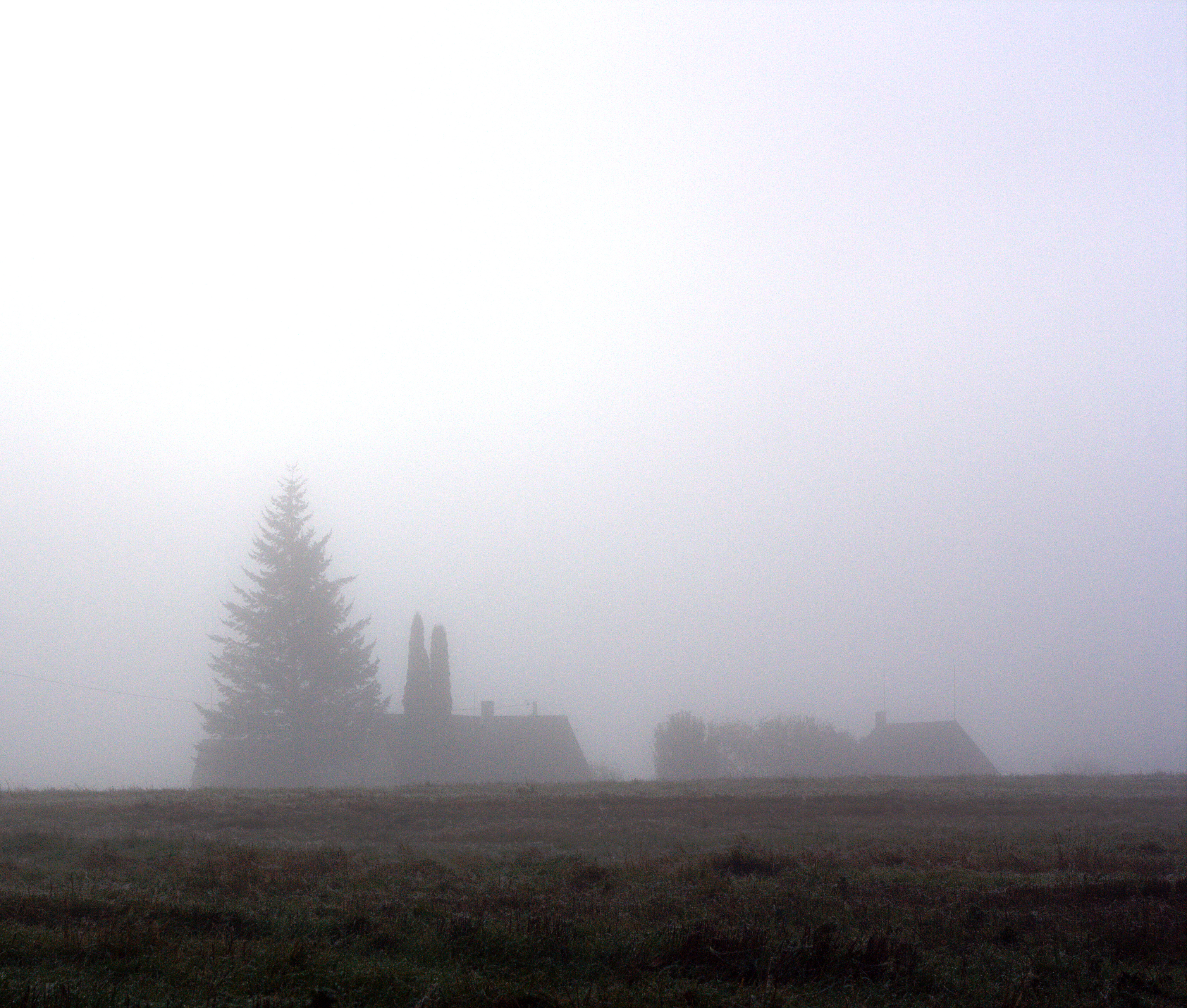 Joosu küla paistmas läbi udu